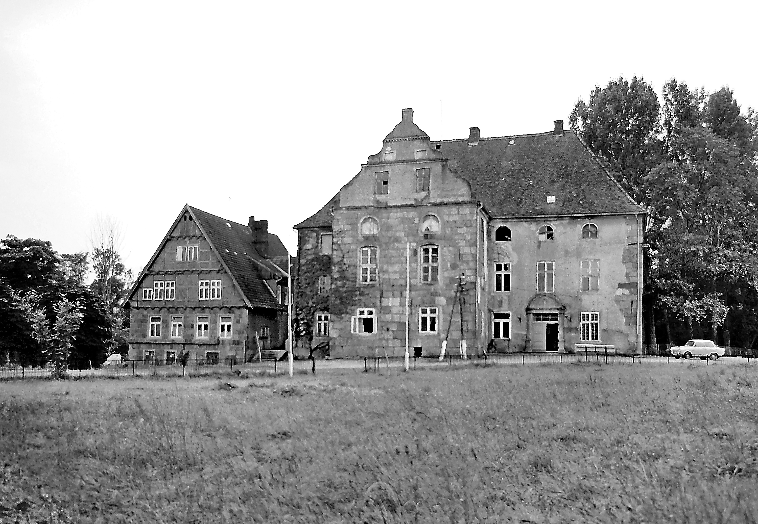 24.09.1987 DDR 2621 [18246] Kurzen Trechow (Bernitt), Am Speicher 1: Schloß (GMP: 53.868864,11.910273) Hofseite. Die heutige Anlage wurde im frühen 19. Jahrhundert auf den Grundmauern und Fundamenten der mittelalterlichen Wasserburg Trechow im Stil der Frührenaissance errichtet. Gutsherren zu Trechow waren seit dem Mittelalter unter anderem die Familien von Trechow, Maltzahn, Plüskow, Oertzen und Familie von Plessen. Nach Kriegsende 1945 wurde das Herrenhaus zunächst als russisches Lazarett und Militärkommandantur genutzt; nachfolgend als Gefängnis-Außenstelle der Justizvollzugsanstalt Bützow. In der DDR-Zeit, ab 1959 bis 1989, dienten die Räume der einstigen Burg dem Gemeinwohl. Im Schloß war die LPG-Verwaltung, Gemeindeverwaltung, Verkaufsstelle, Gemeindeschwesterzimmer, Kino, Kindergarten, Kinderkrippe, Kulturraum und Gaststätte. [R19870923B09.jpg]19870924040NR.JPG(c)Blobelt